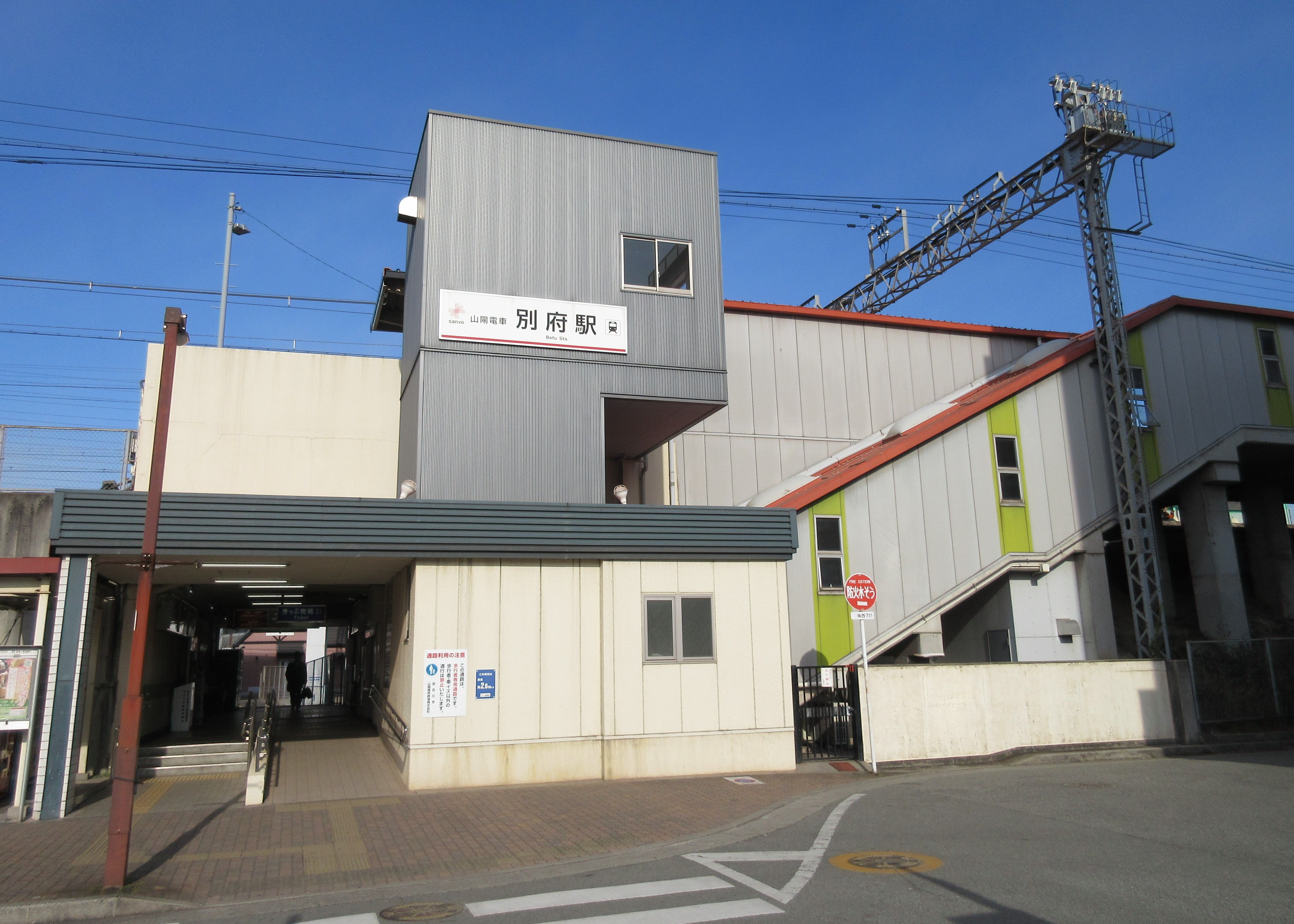 山陽電鉄別府駅